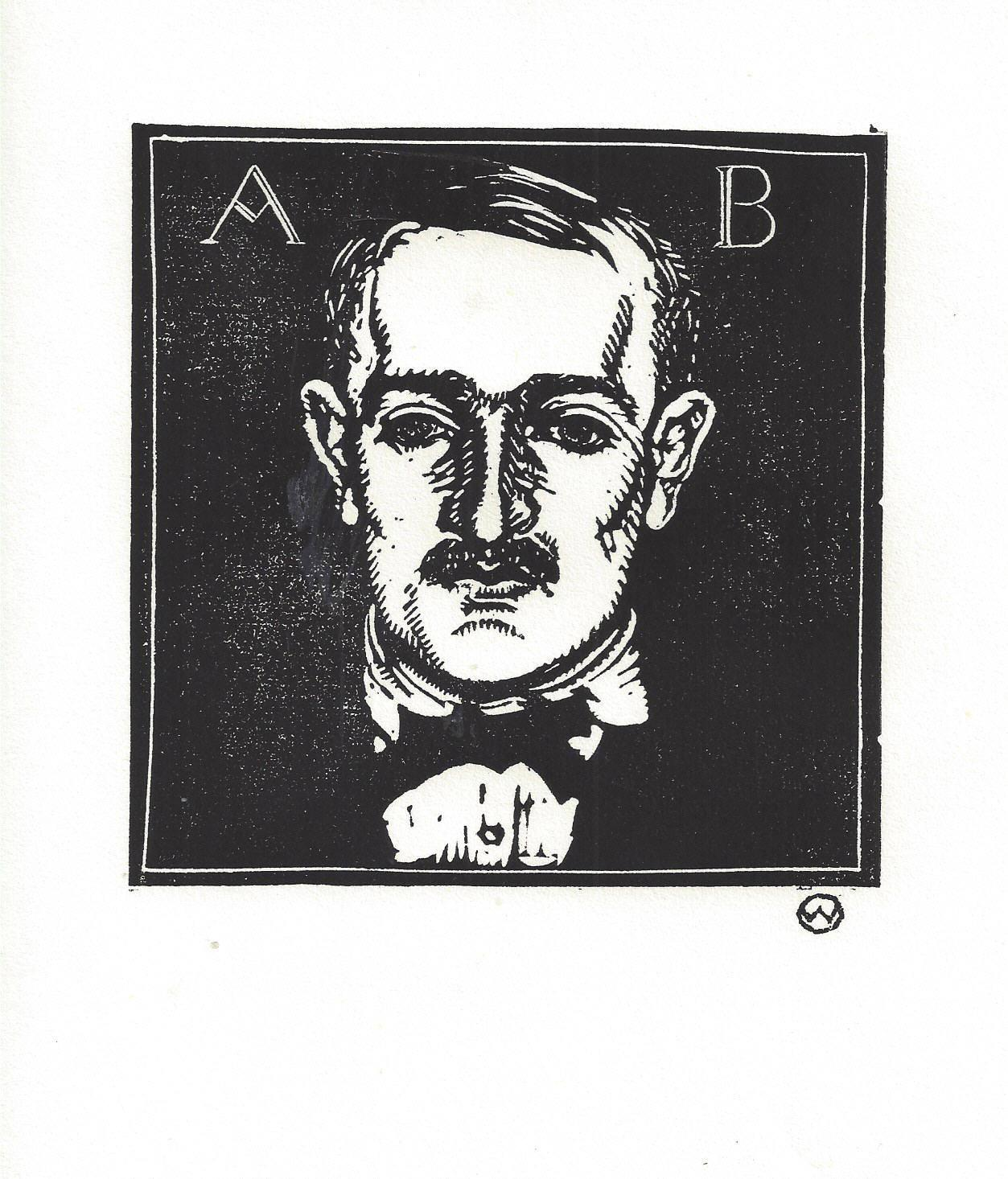 Porträt Dr. Albin Alfred Bäumler. 1914 [1]